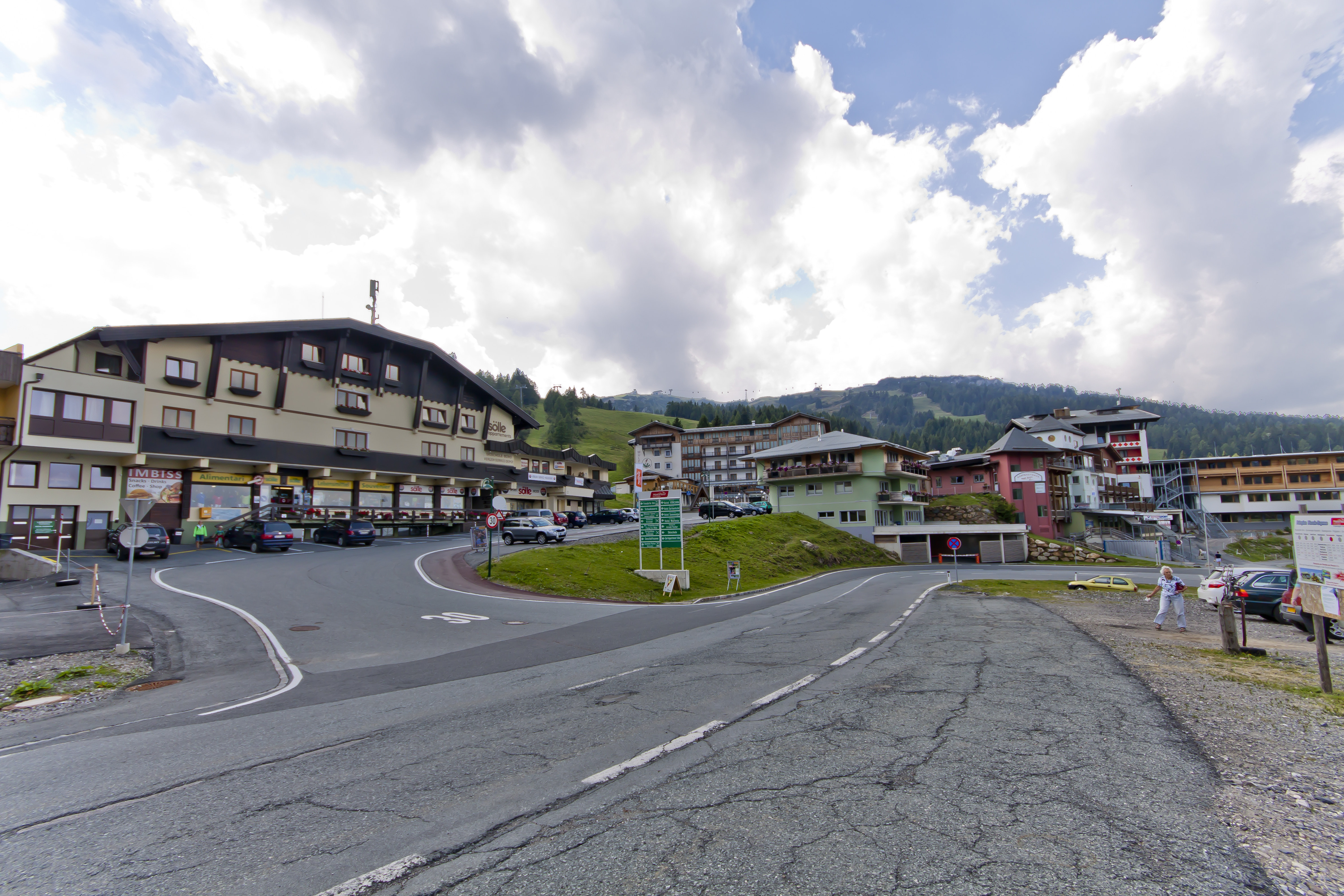 Nassfeld in Summer